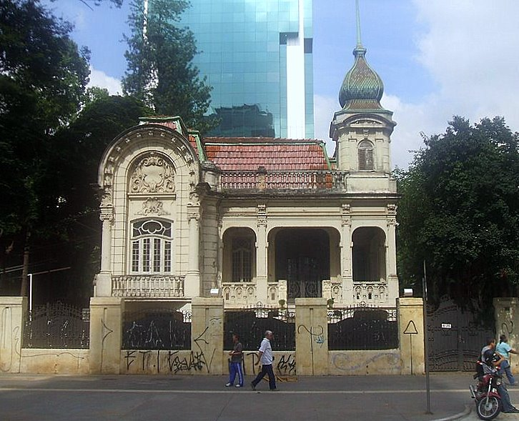 Residência de Joaquim Franco de Mello, na Avenida Paulista, São Paulo, Brasil.